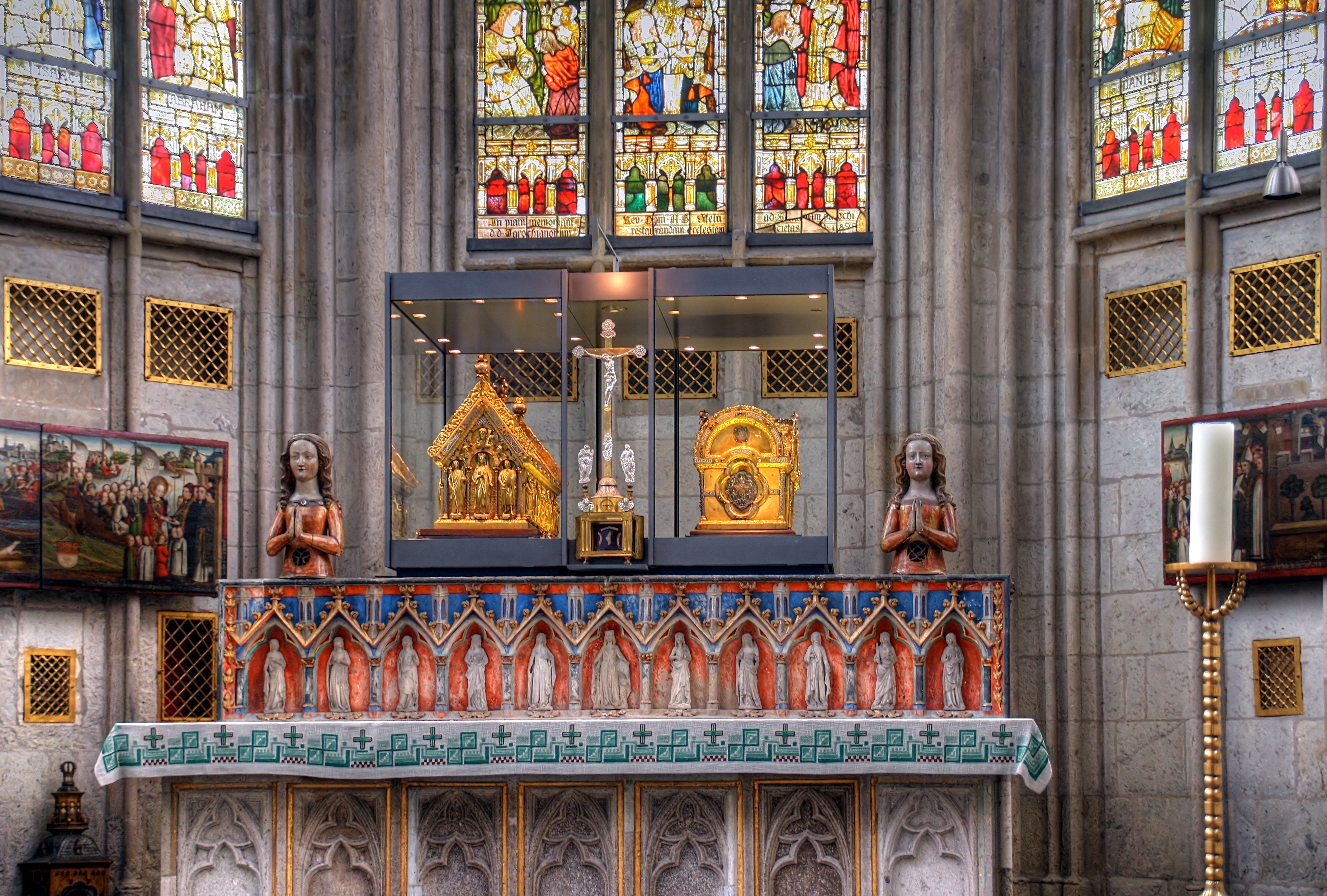 Ursulabüsten und Schreine im Chor von St. Ursula, Köln.